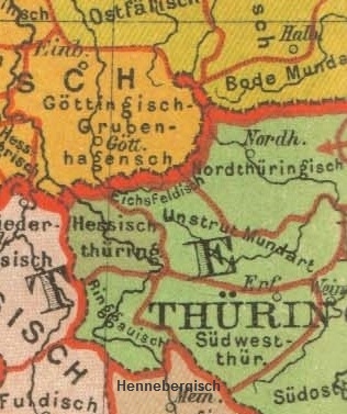 Westthüringische Mundarten